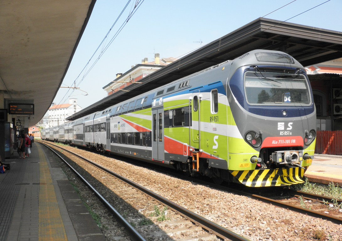 Un Treno Servizio Regionale (TSR) in servizio sulla linea S1 del servizio ferroviario suburbano di Milano, in sosta al capolinea di Lodi